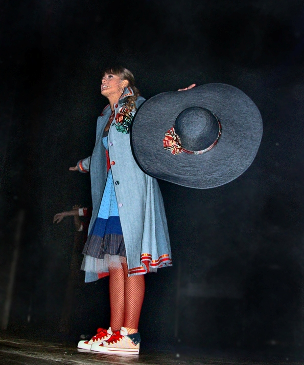 Juliana Silveira atuando como Flor no musical Floribella.